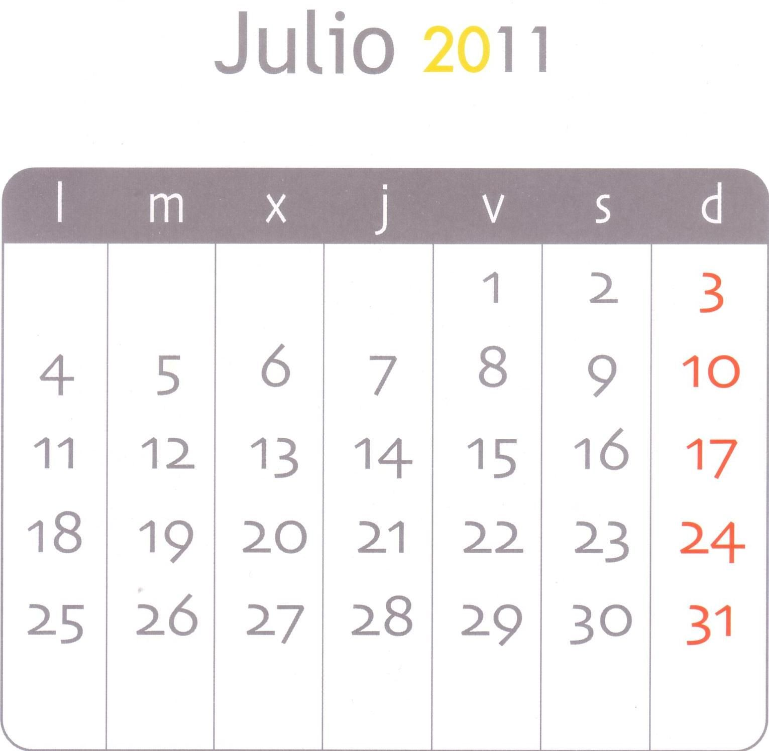 kalendaro